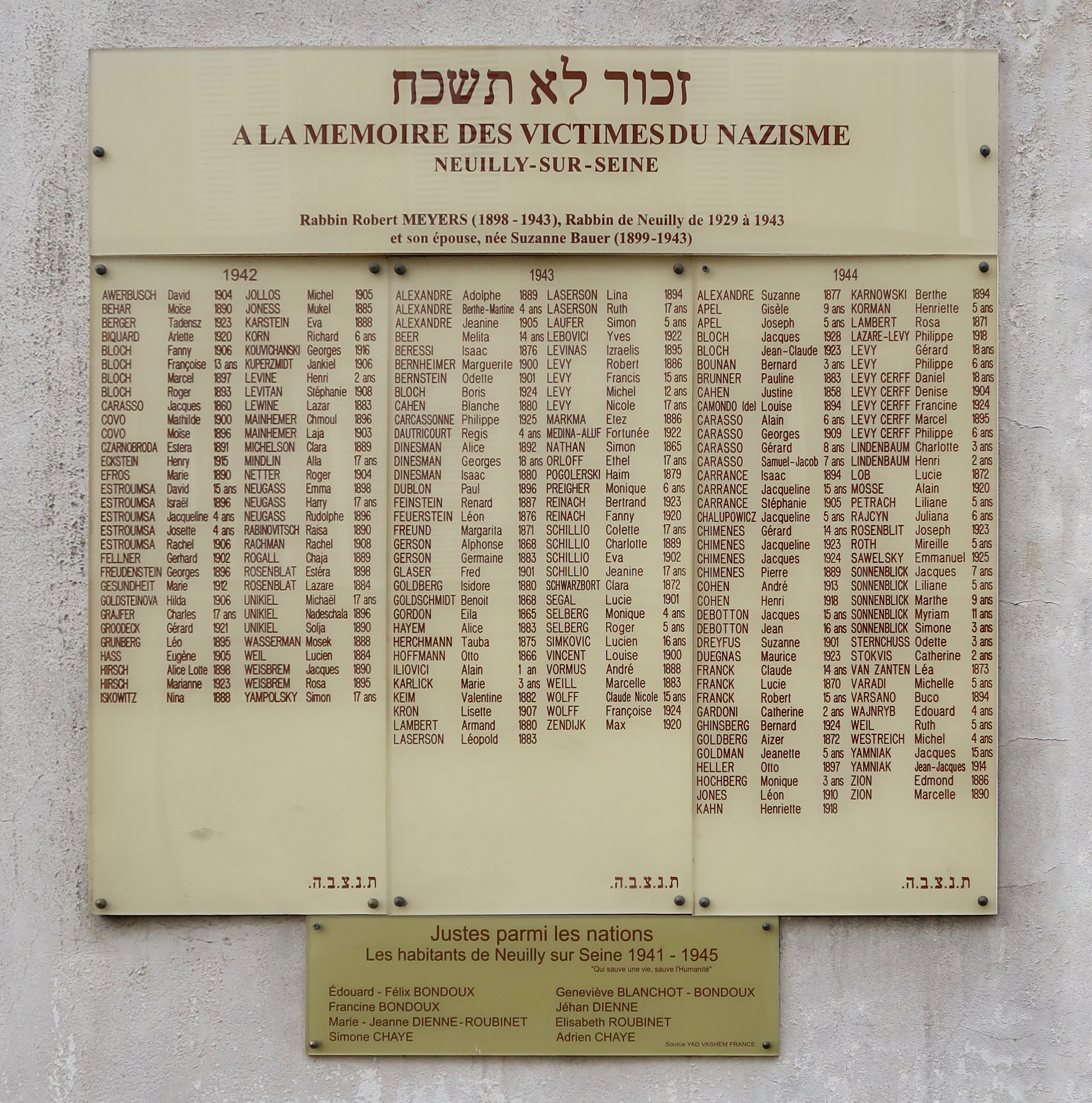 Plaque en mémoire des Juifs victimes du nazisme, synagogue de Neuilly-sur-Seine, 10 bis rue Ancelle (Hauts-de-Seine).